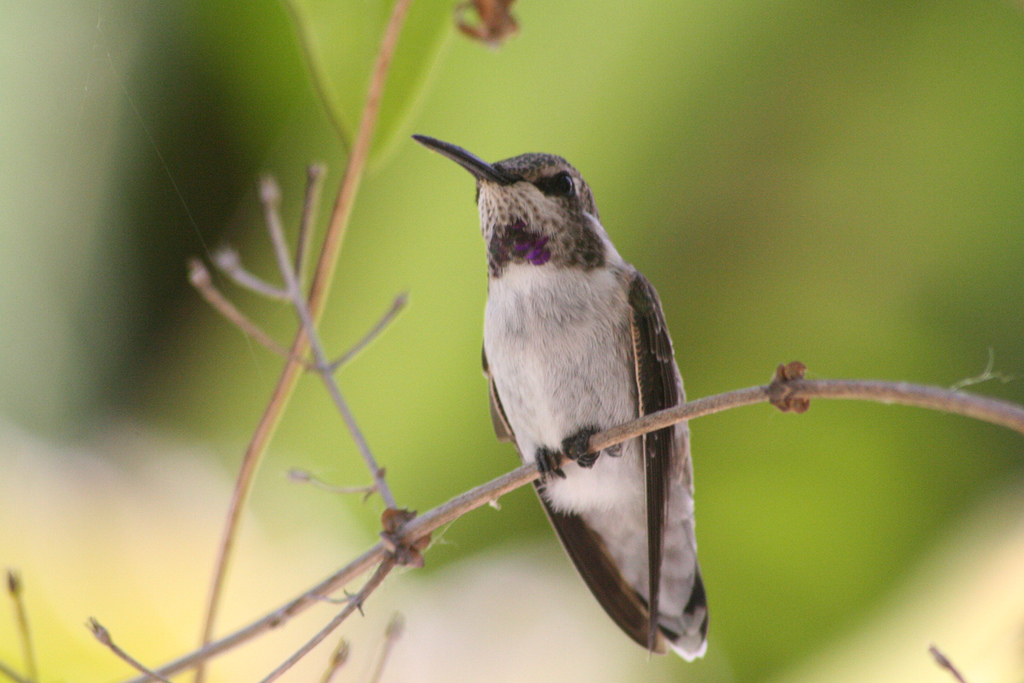 juvenile male Costa's Hummingbird (Calypte costae)